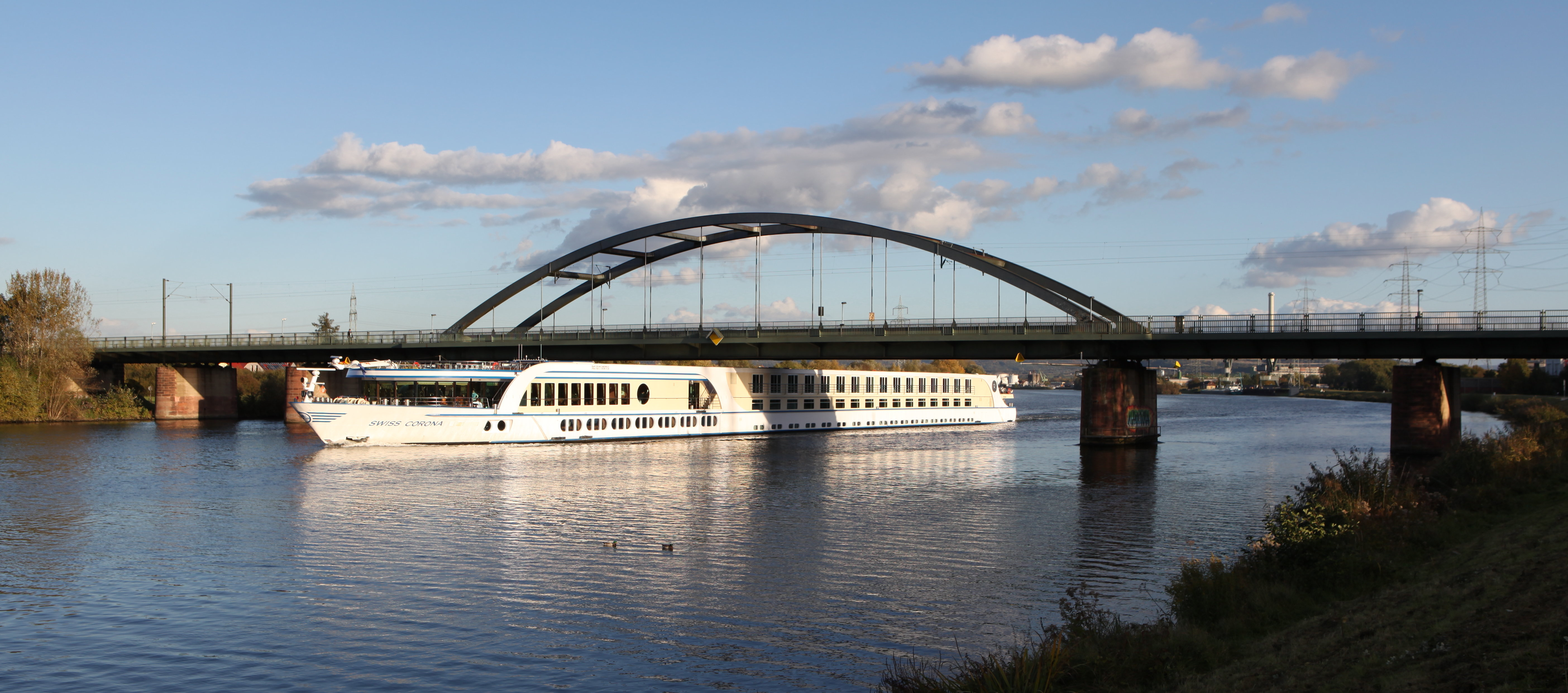 Mainbrücke Stockstadt, Eisenbahnstrecke Darmsstadt-Aschaffenburg, Landkreis Aschaffenburg, mit der Swiss Corona